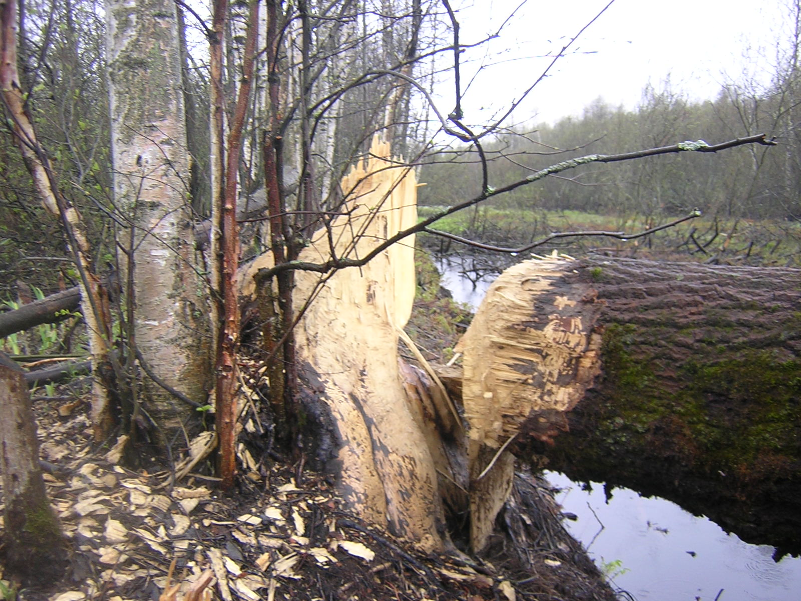 Осина на берегу небольшого водотока в Юнтоловском заказнике (Санкт-Петербург, Россия). Подгрызана бобрами.